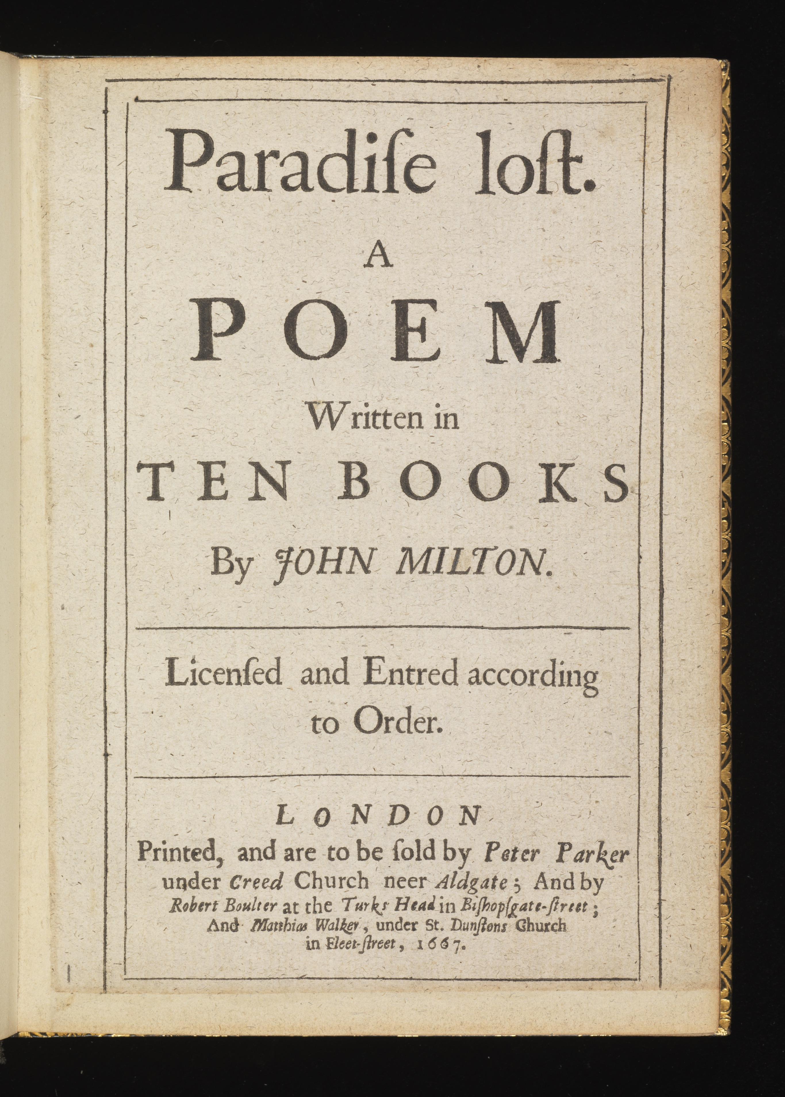 "Paradise Lost", de John Milton, édition originale de 1667. Conservée à la Fondation Martin Bodmer.